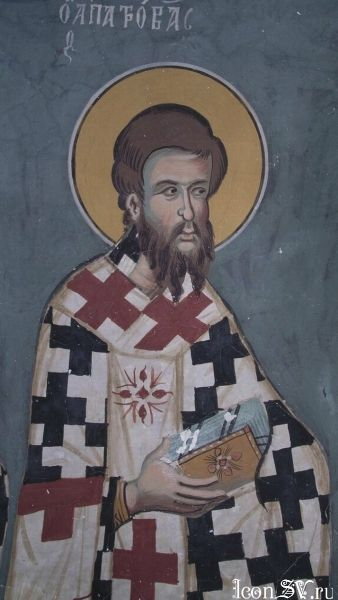 Святой апостол Патров Кипр, Калопанайотис, монастырь св. Иоанна Лампадистиса. 1400 год